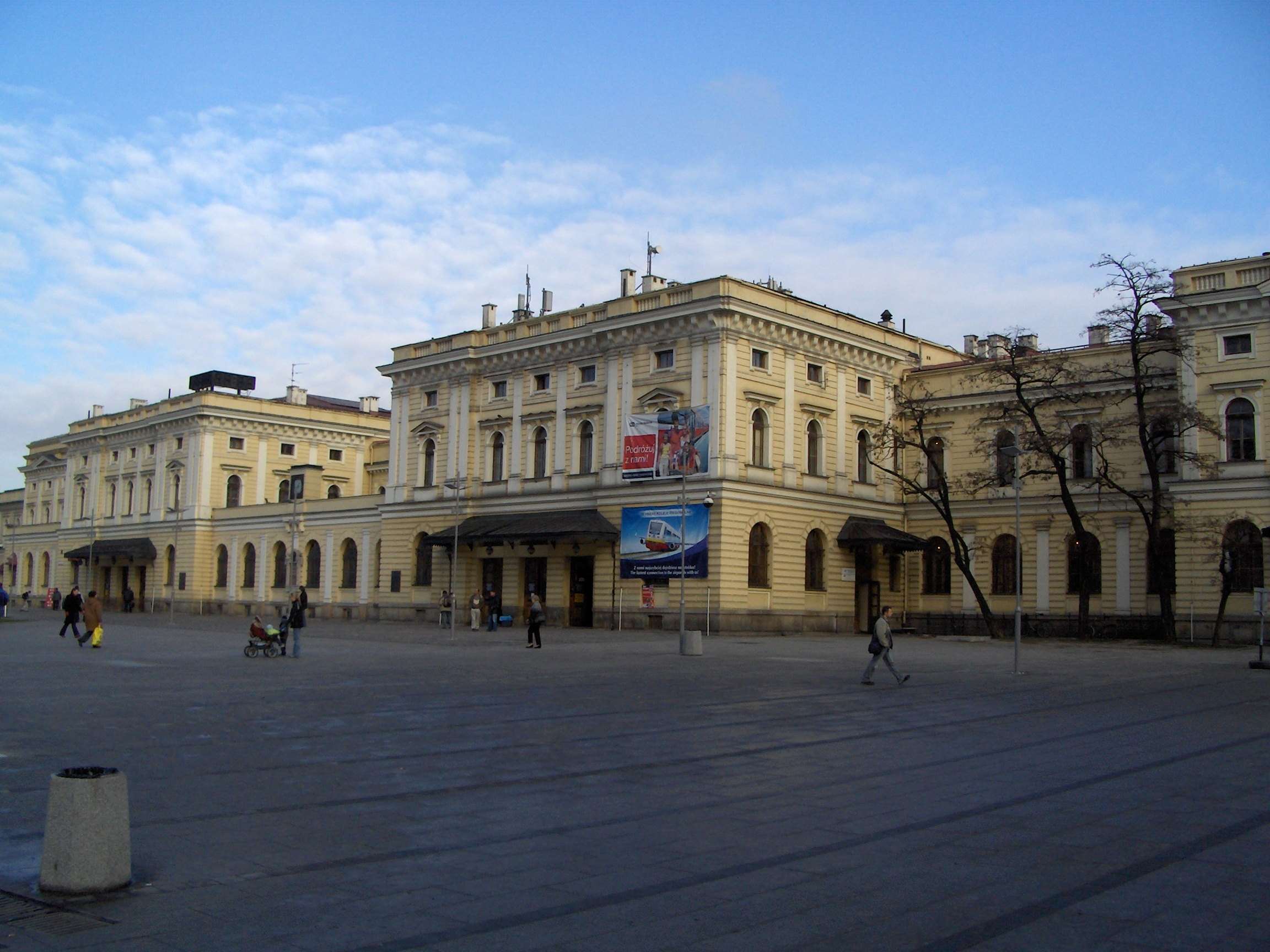 Budynek Głównego Dworca Kolejowego w Krakowie przy Placu Kolejowym .